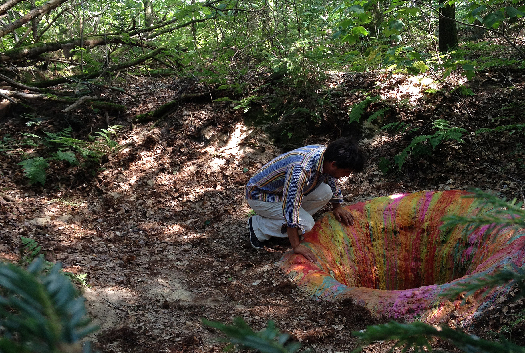 Jonas Liveröds verk Landscape painting (the hole) i Skovsnogen artspace på Jylland. Liveröd curaterade en utställning till Skovsnogen och gjorde i samband med detta verket som numera är förstört.